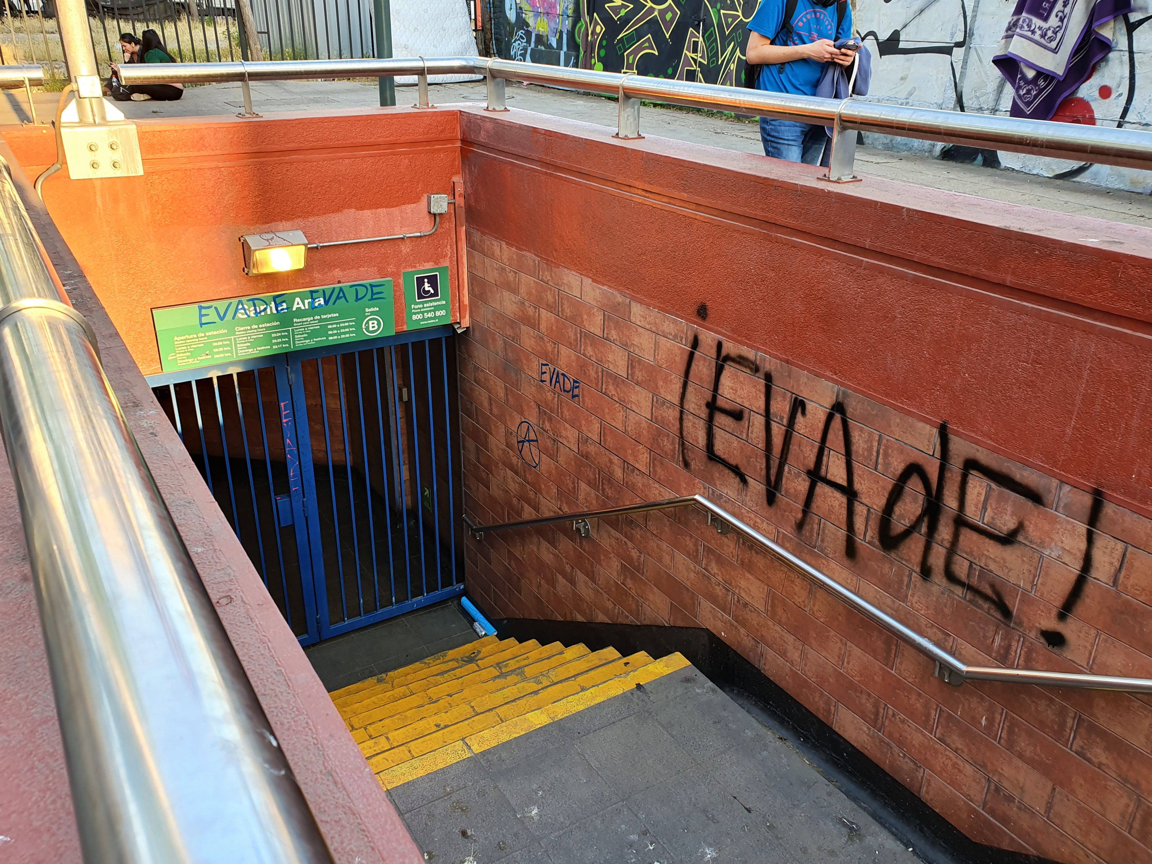 La estación Santa Ana del Metro de Santiago, cerrada durante las protestas de 2019 en Santiago, Chile.